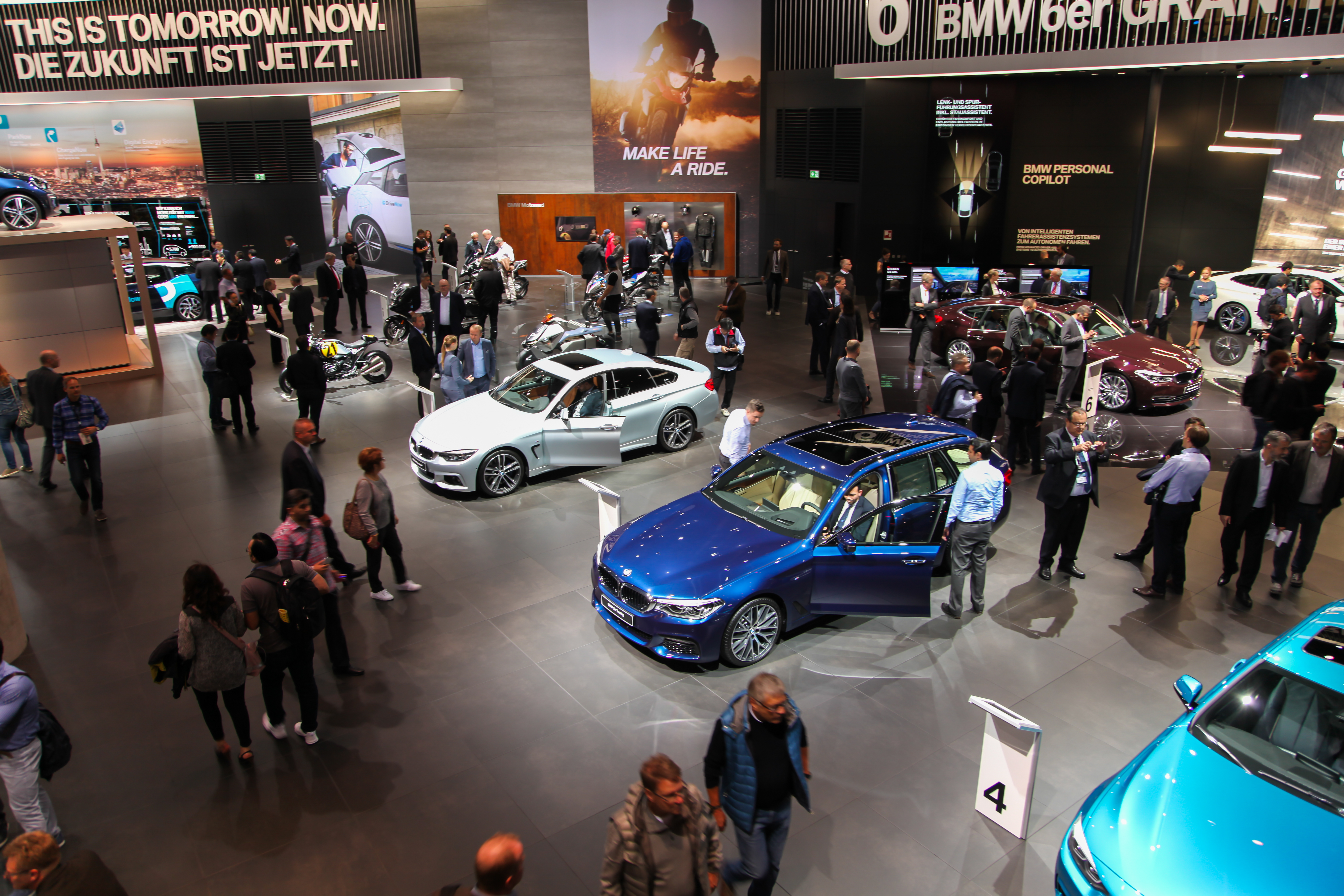 BMW auf der IAA 2017